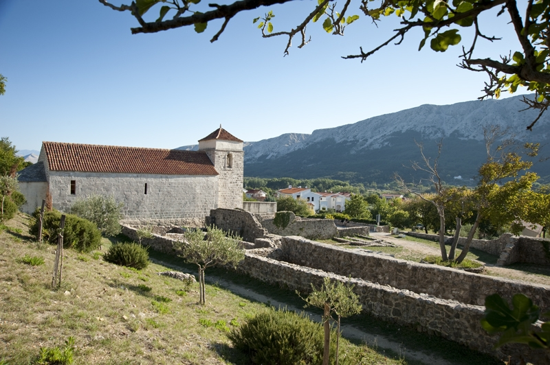 Crkva sv. Lucije u Jurandvoru